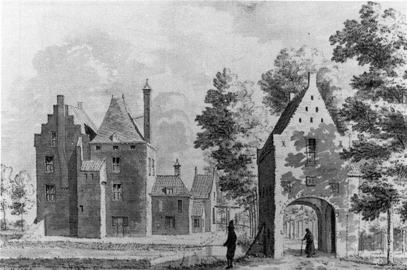 De ridderhofstad Den Engh te Vleuten in 1731 afgebeeld door L.P. Serrurier